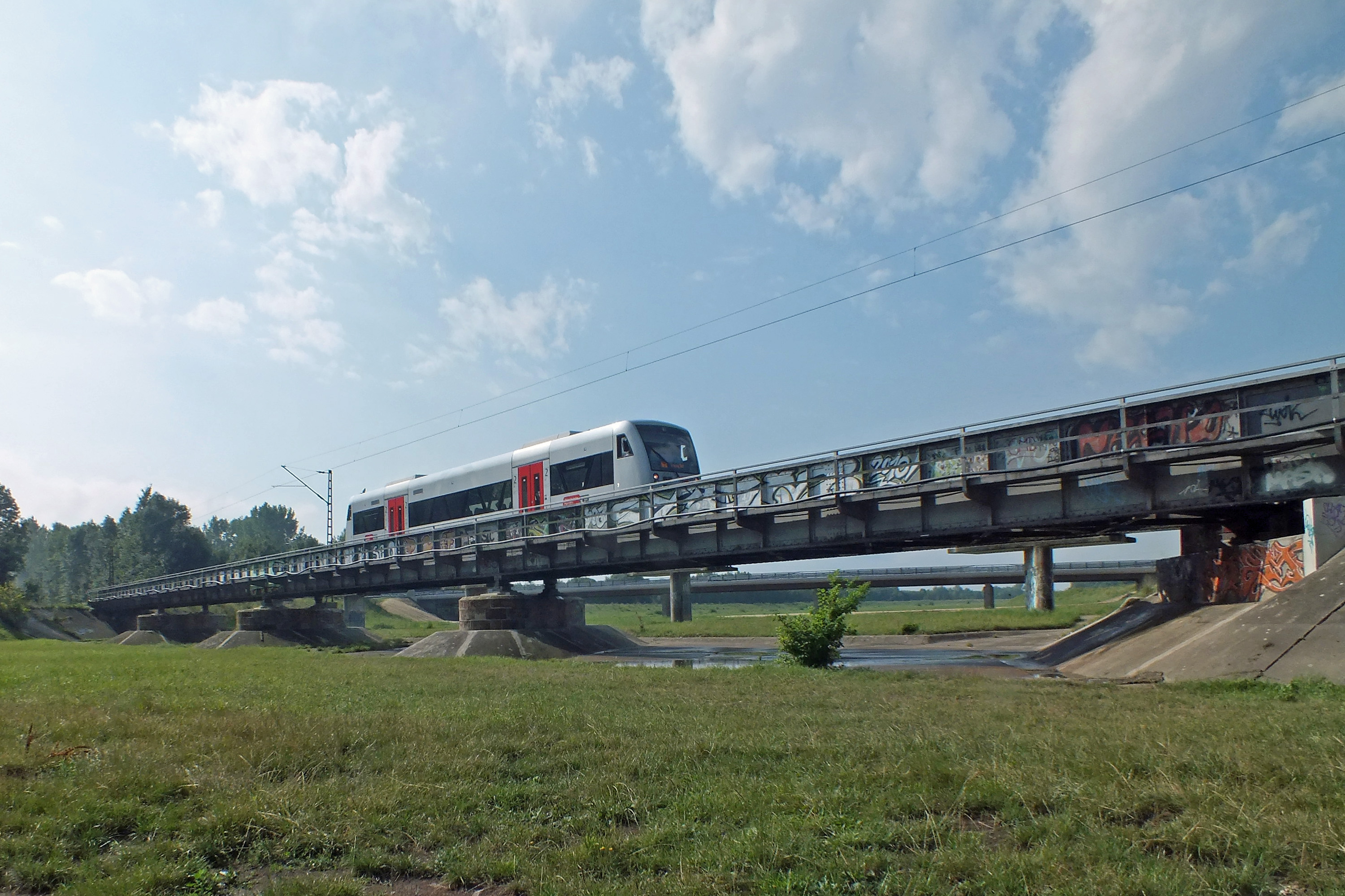 Die Eisenbahnbrücke über das Elsterhochflutbett in Leipzig, dahinter die 2013 erbaute Straßenbrücke